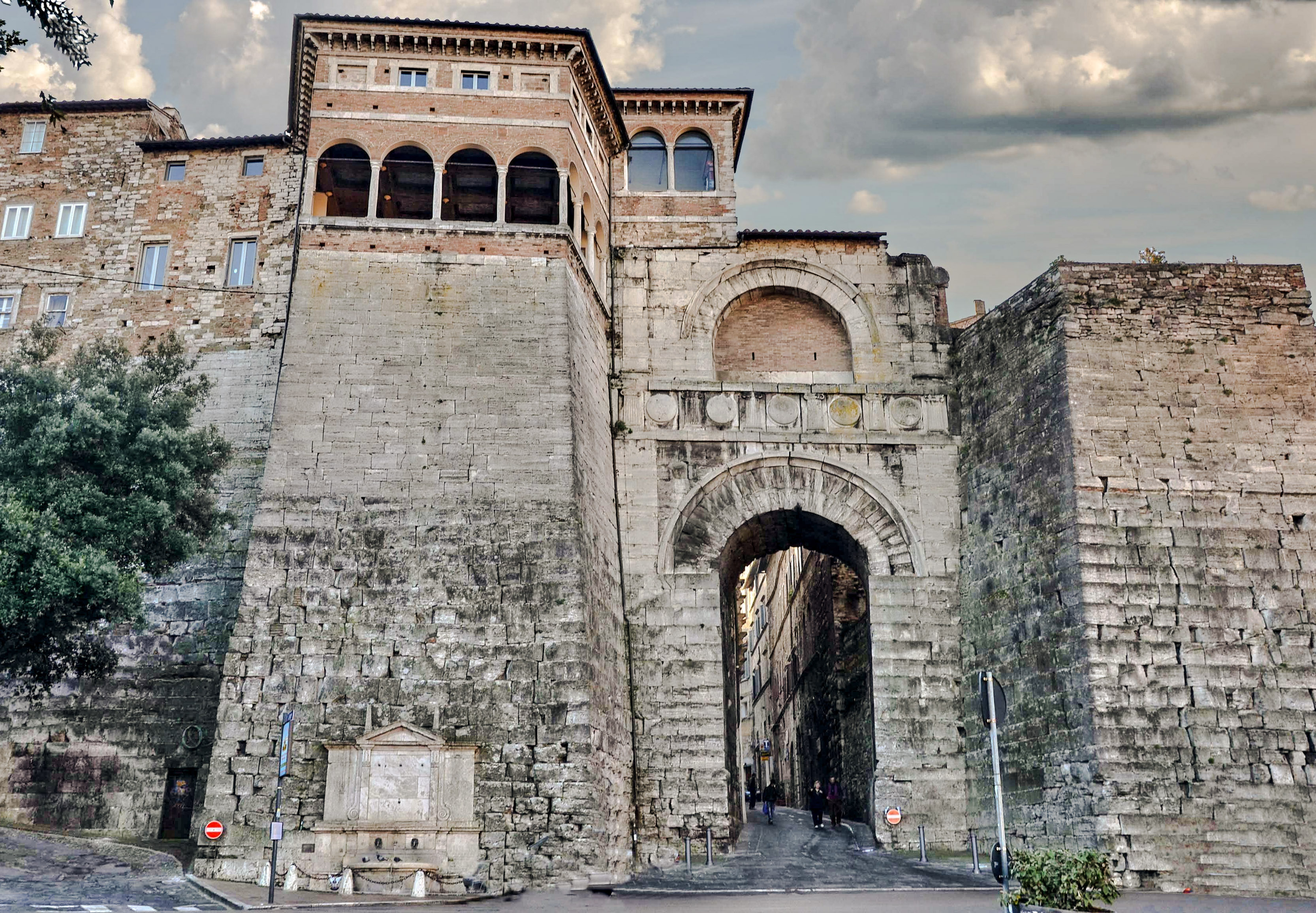 ARCO ETRUSCO o di AUGUSTO seconda metà del III secolo a.c.